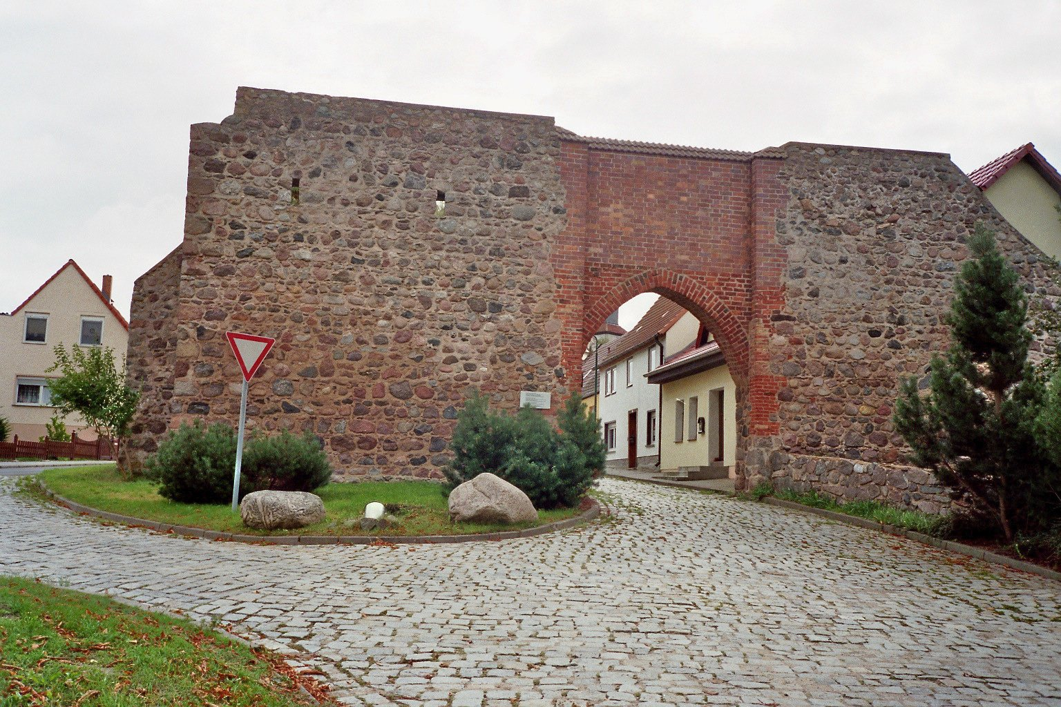 Eines der Stadttore von Fürstenwerder, Brandenburg